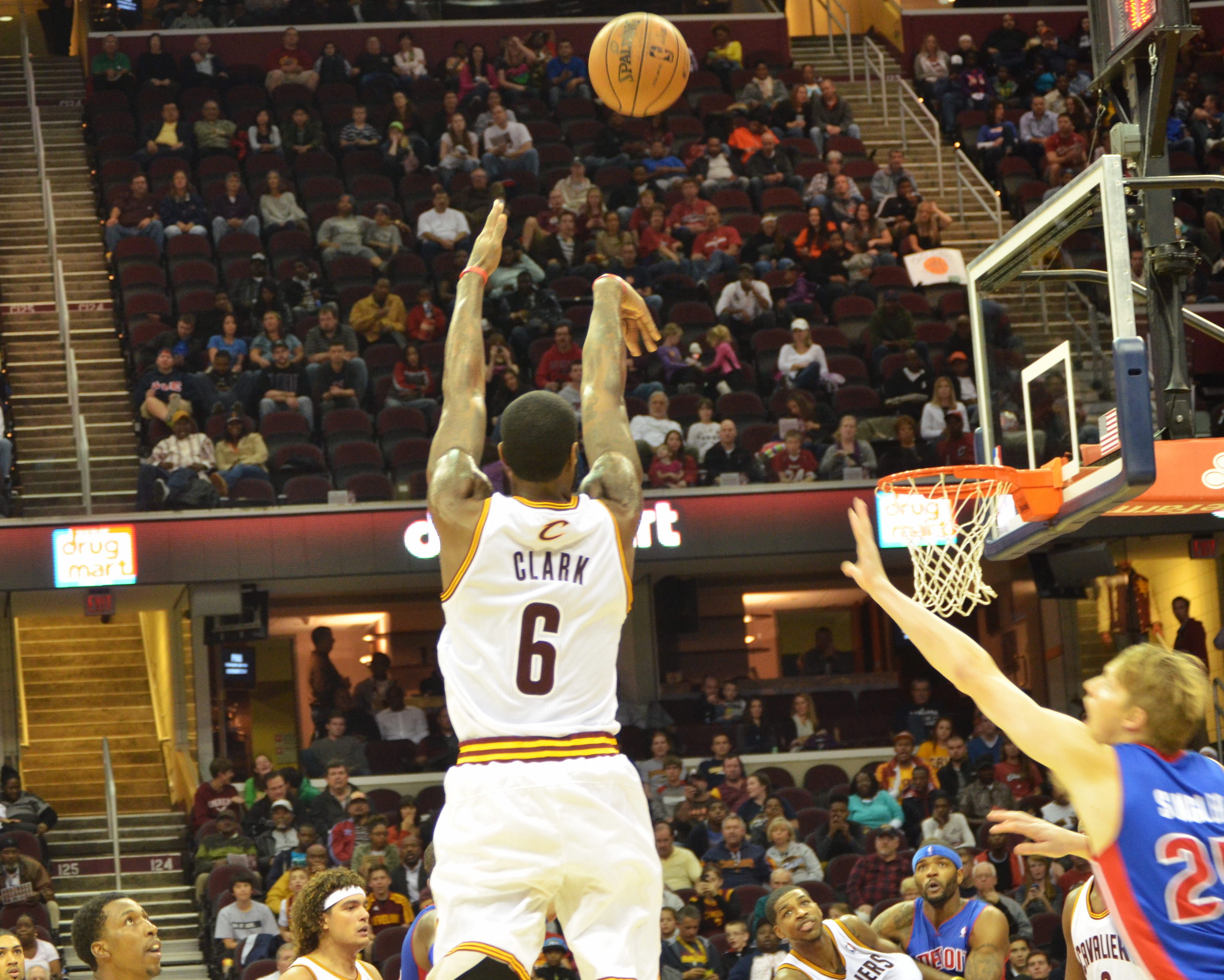 Earl Clark